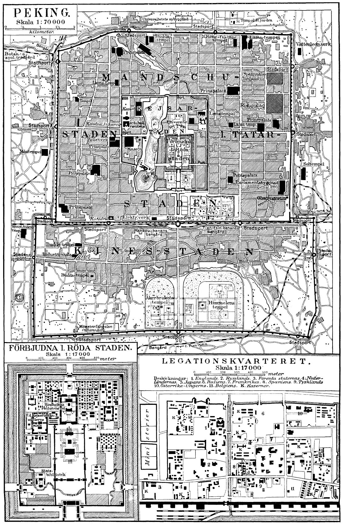 Beijing in 1916